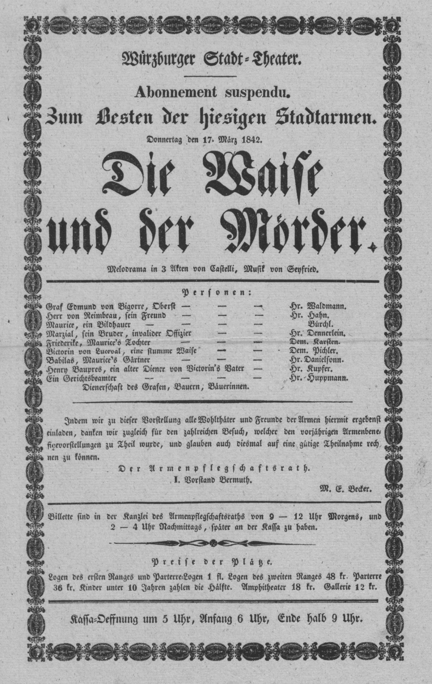 Theatre poster, Castelli: Die Waise und der Mörder